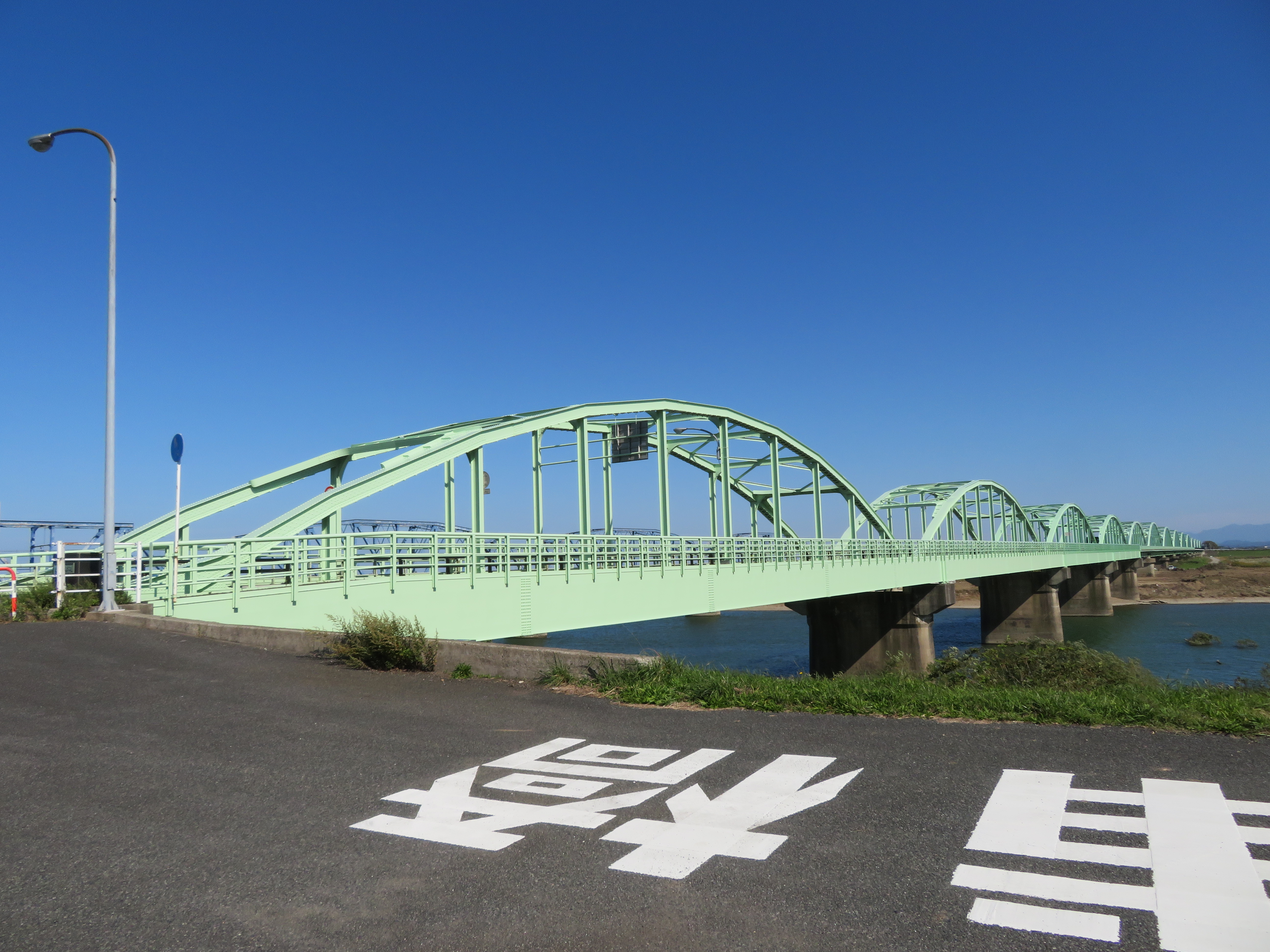 国道460号線阿賀野川に架かる阿賀浦橋（新潟市秋葉区中新田側から撮影） Canon PowerShot SX720 HS